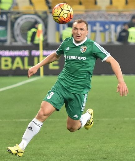 Сергій Сімінін - український футболіст